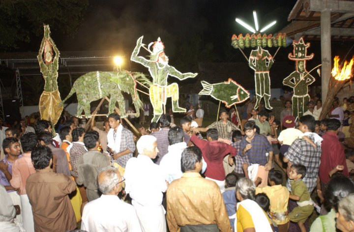 Plavila